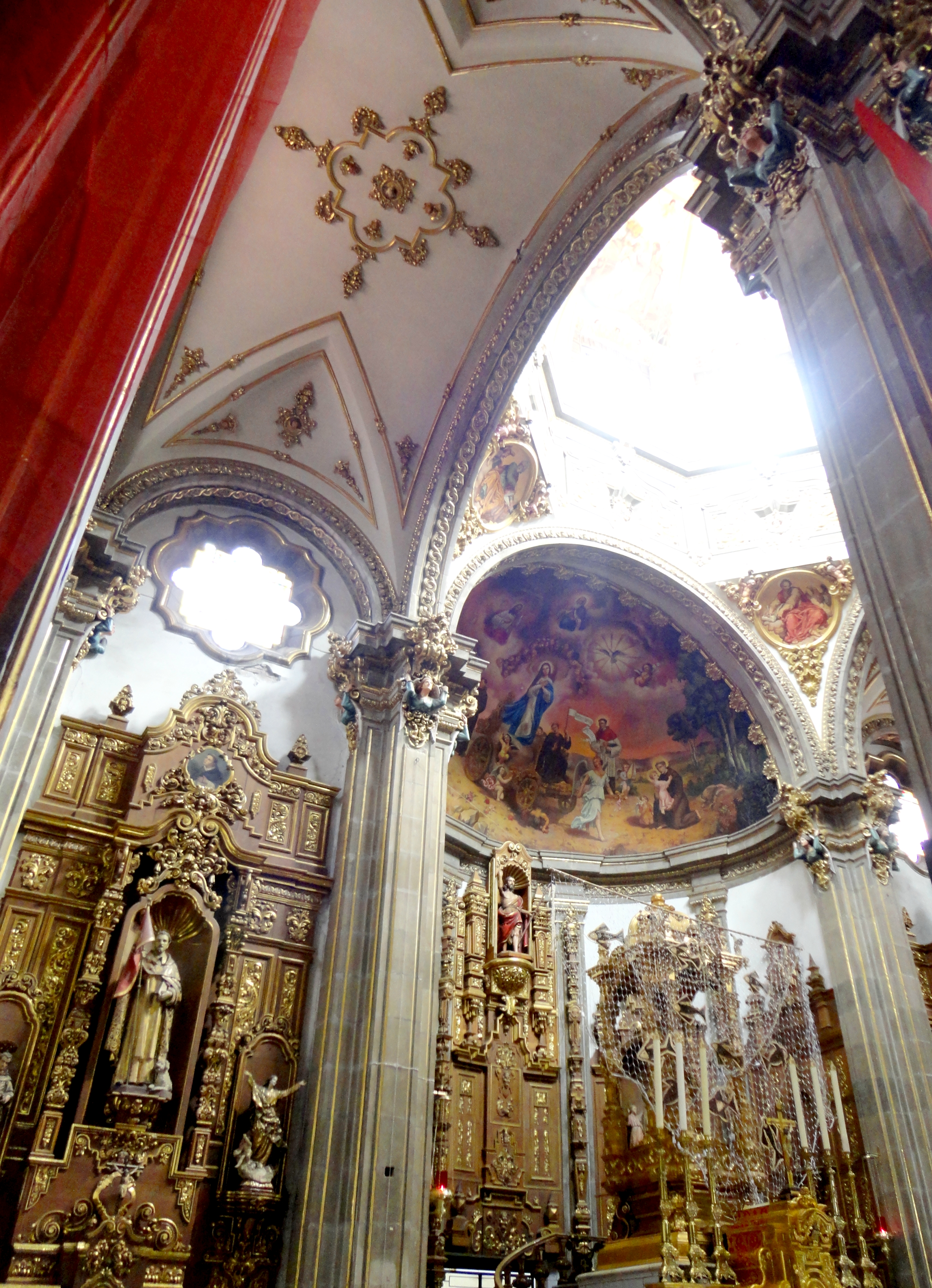 Iglesia de San Juan Bautista en Coyoacán, Ciudad de México.